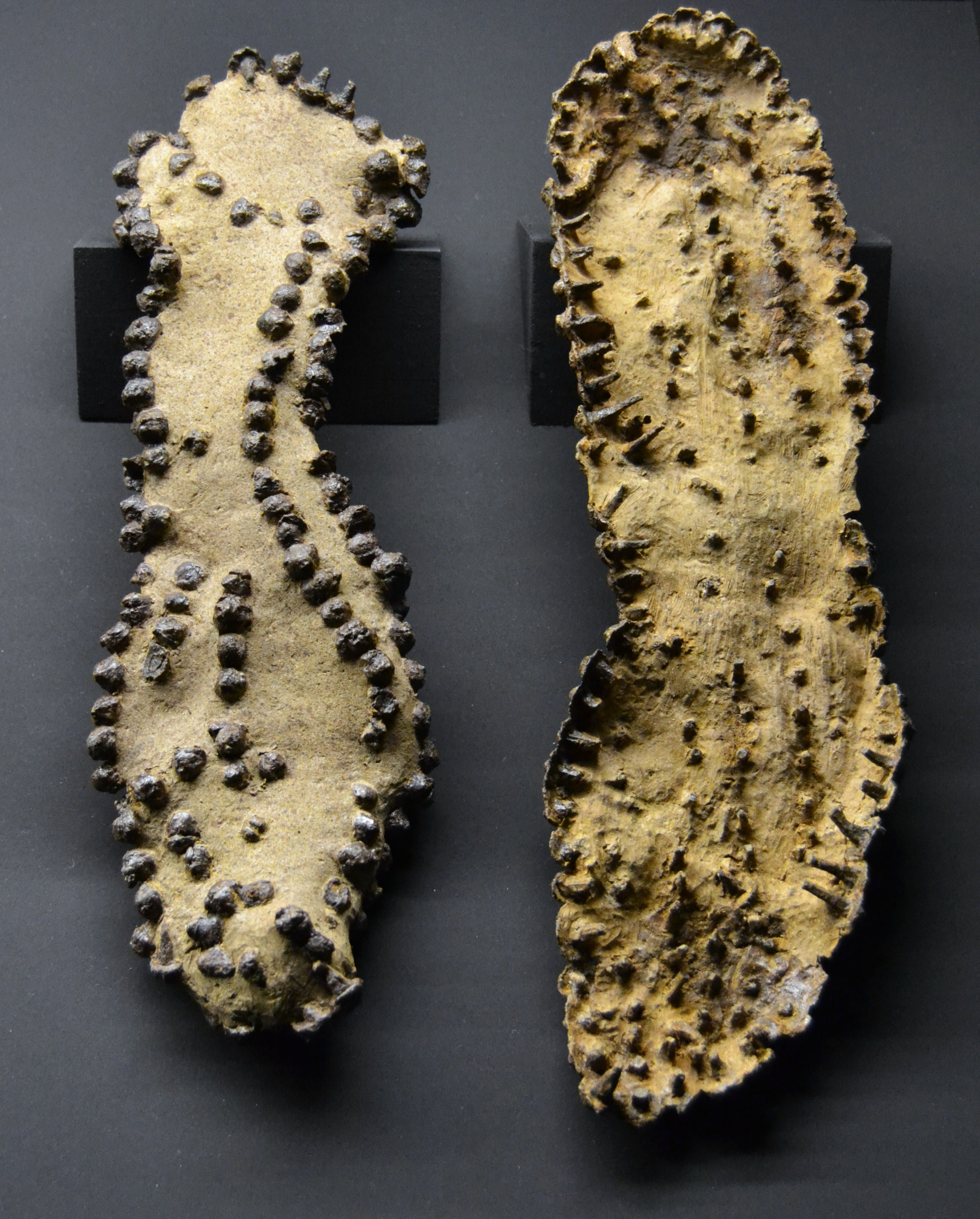 Parell de soles de sandàmlies (caligae), s'ha conervat la seua forma pels claus de reforç. Necròpolis de l'Albir (l'Alfàs del Pi), principis del segle IV. Museu Arqueològic d'Alacant.